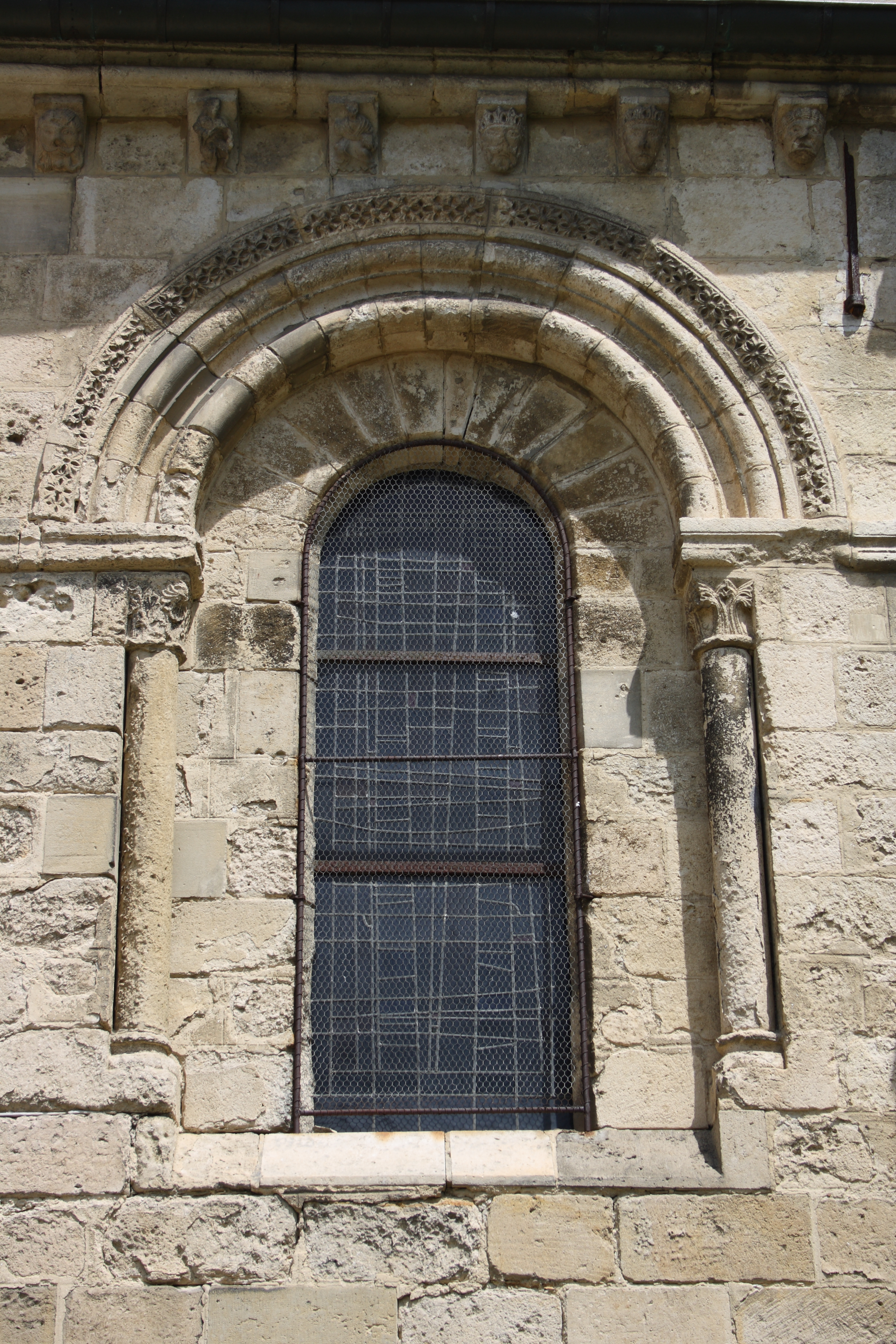 katholische Pfarrkirche Saint-Sulpice in Chars